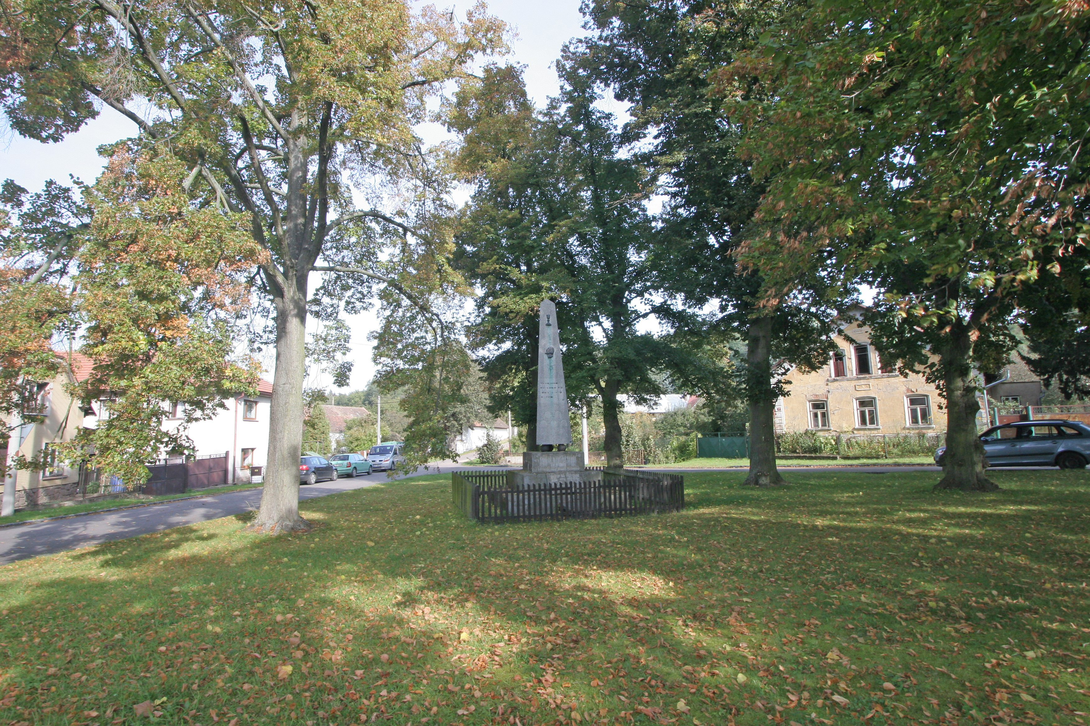 Morašice pomník Mistra Jana Husa